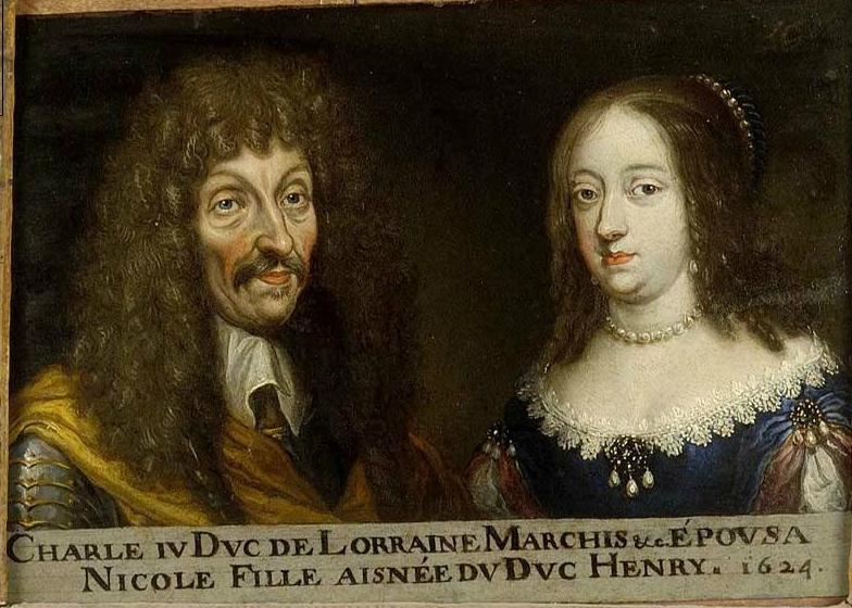 Portrait de Charles IV, duc de Lorraine et de Bar, et de son épouse Nicole de Lorraine. Ce tableau fait partie d'une suite d'une soixantaine de double-portraits représentant les ducs et duchesses de Lorraine ainsi que leurs ancêtres supposés.